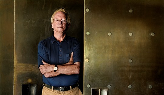 פרופסור לפילוסופיה - אבישי מרגלית